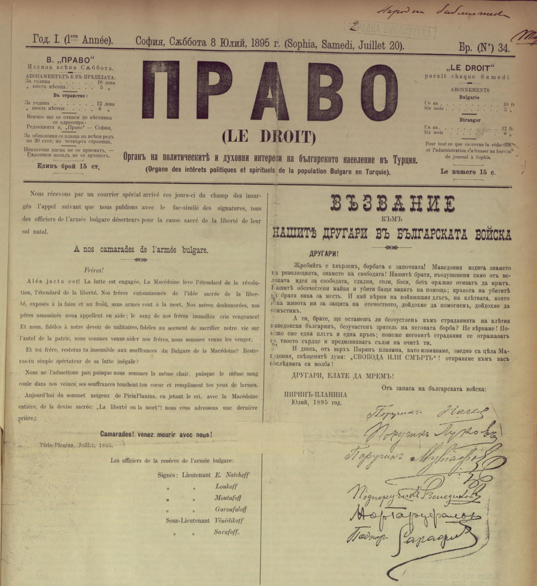 Апел на Върховния комитет при Четническата акция от 1895 година във вестник Право.